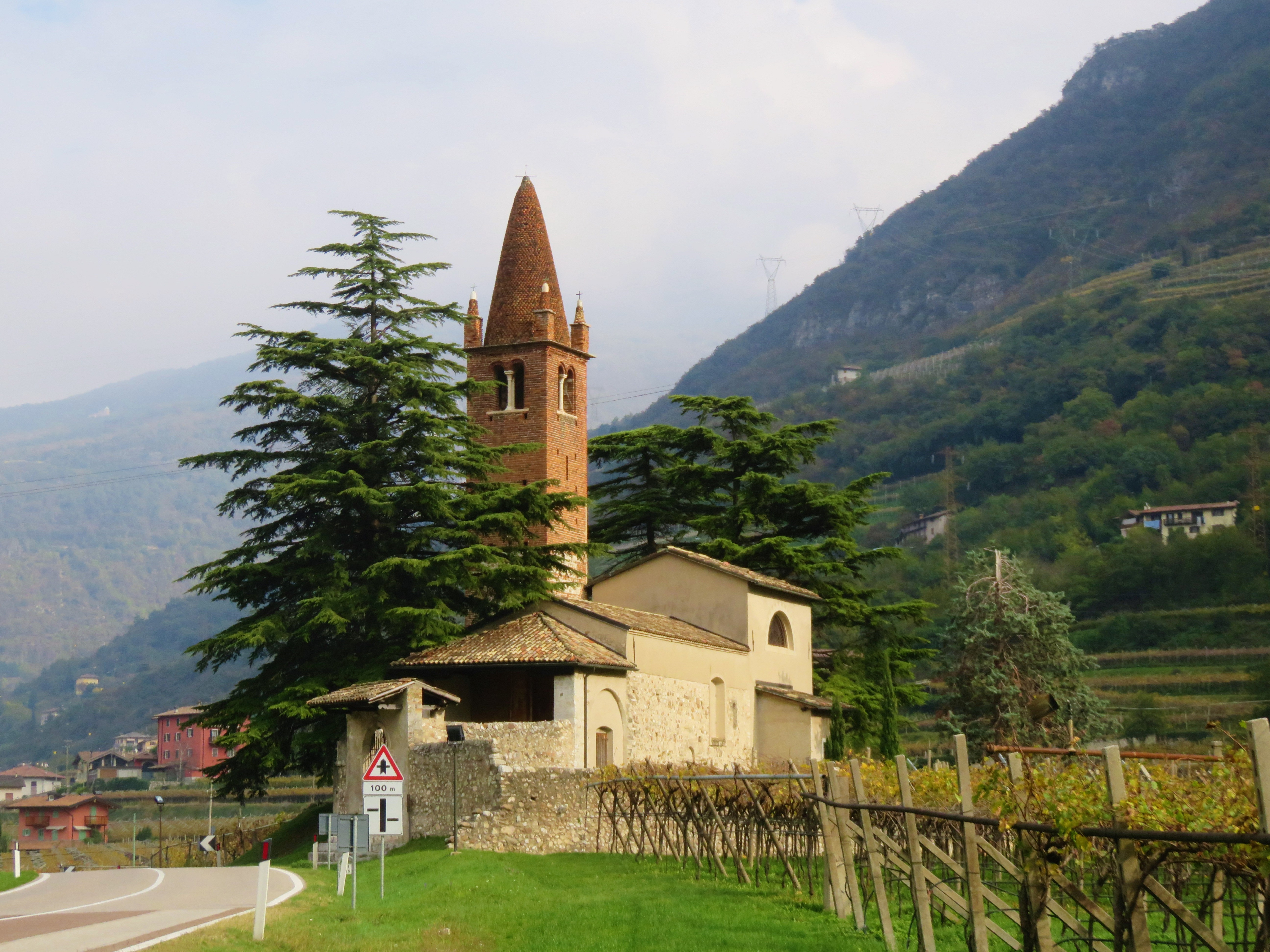 Chiesa vista dalla Strada Statale 12, sulla strada da Verona ad Ala.